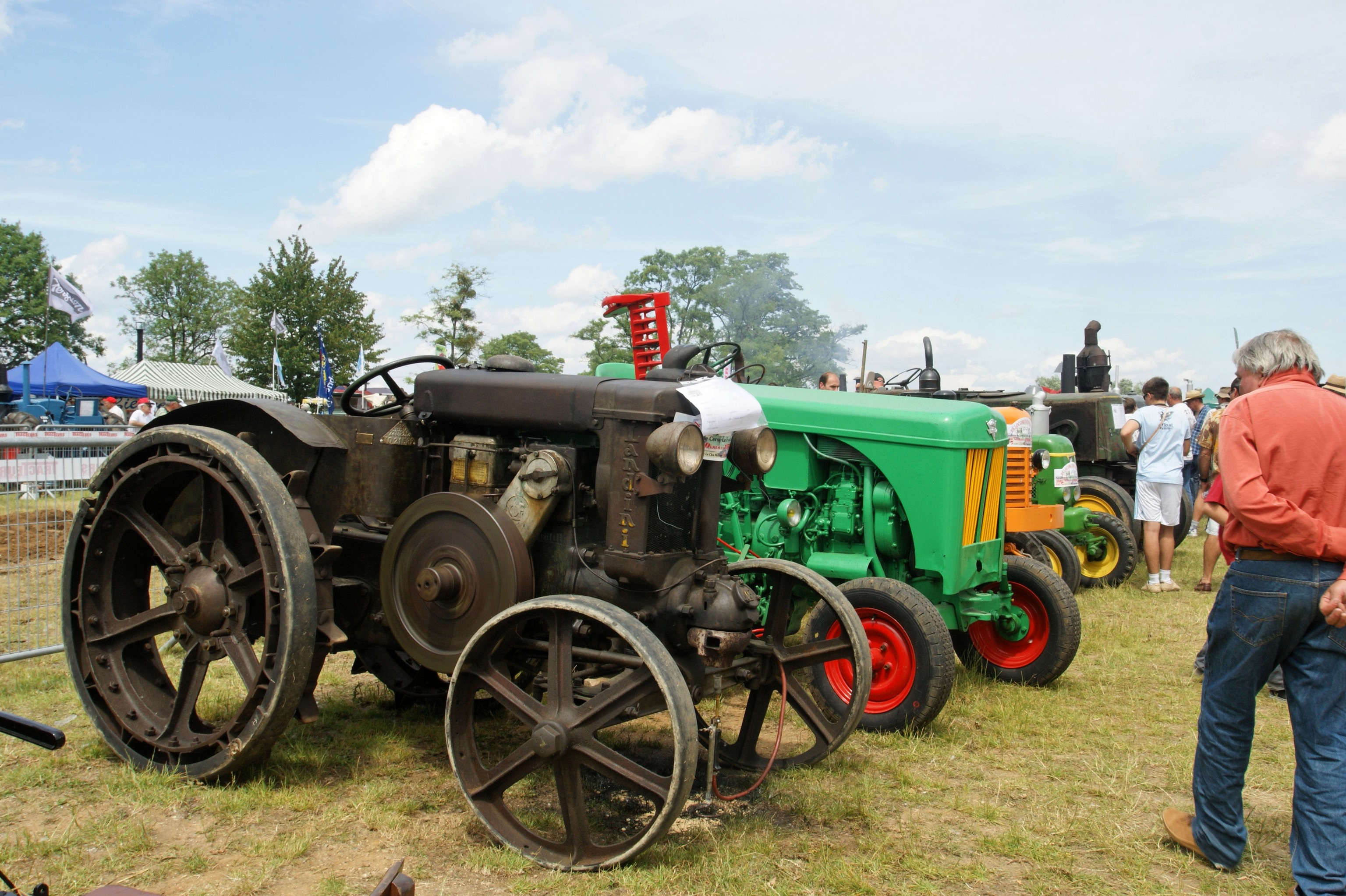 Exposition à La Locomotion en Fête